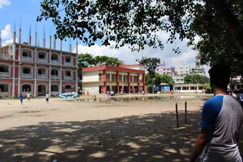 কলেজের খেলার মাঠ।